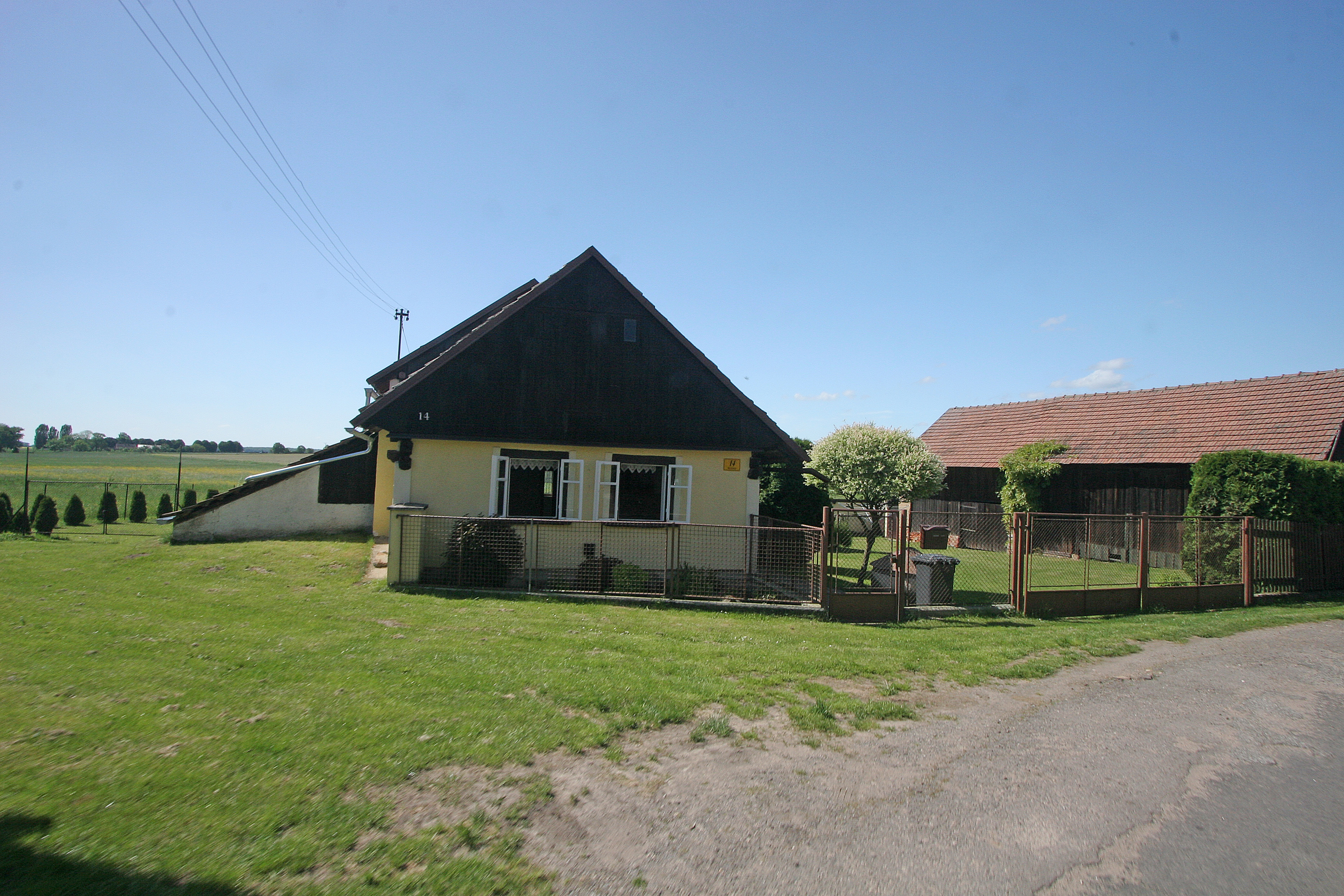 Ostrov čp. 14